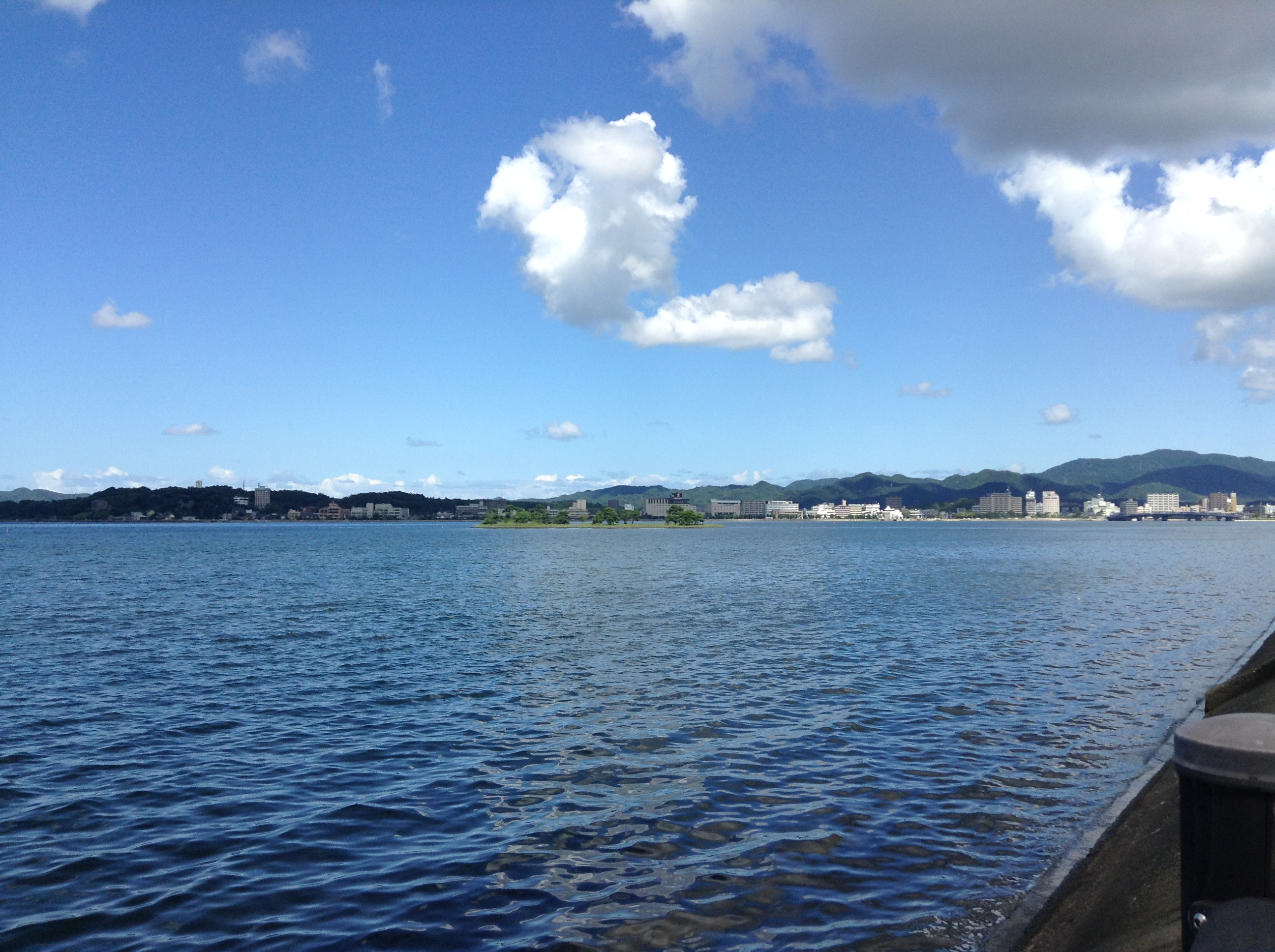 17 Yomeshimachō, Matsue-shi, Shimane-ken 690-0047, Japan